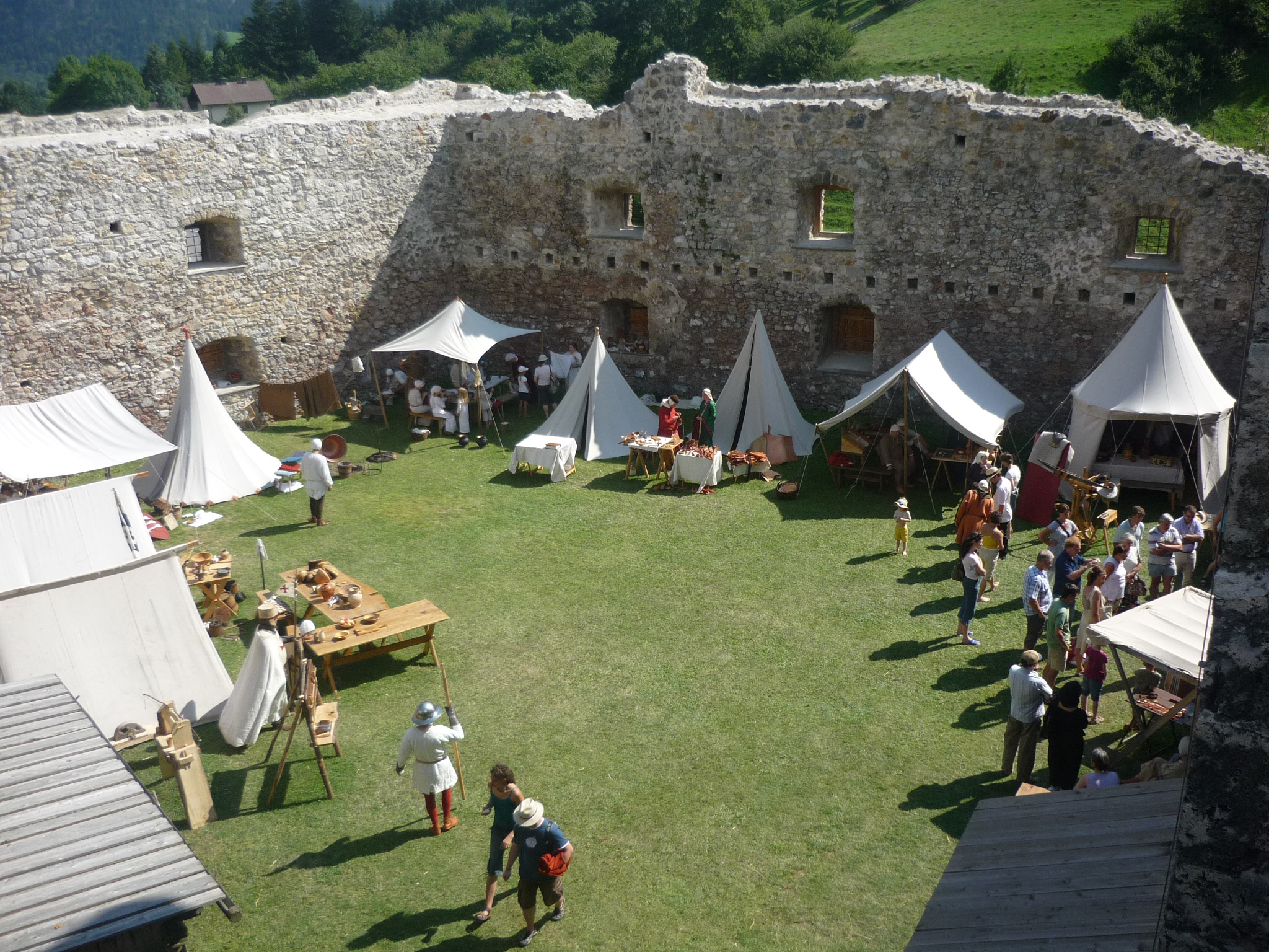 Die Burgruine Puchberg beim Burgfest, Österreich.